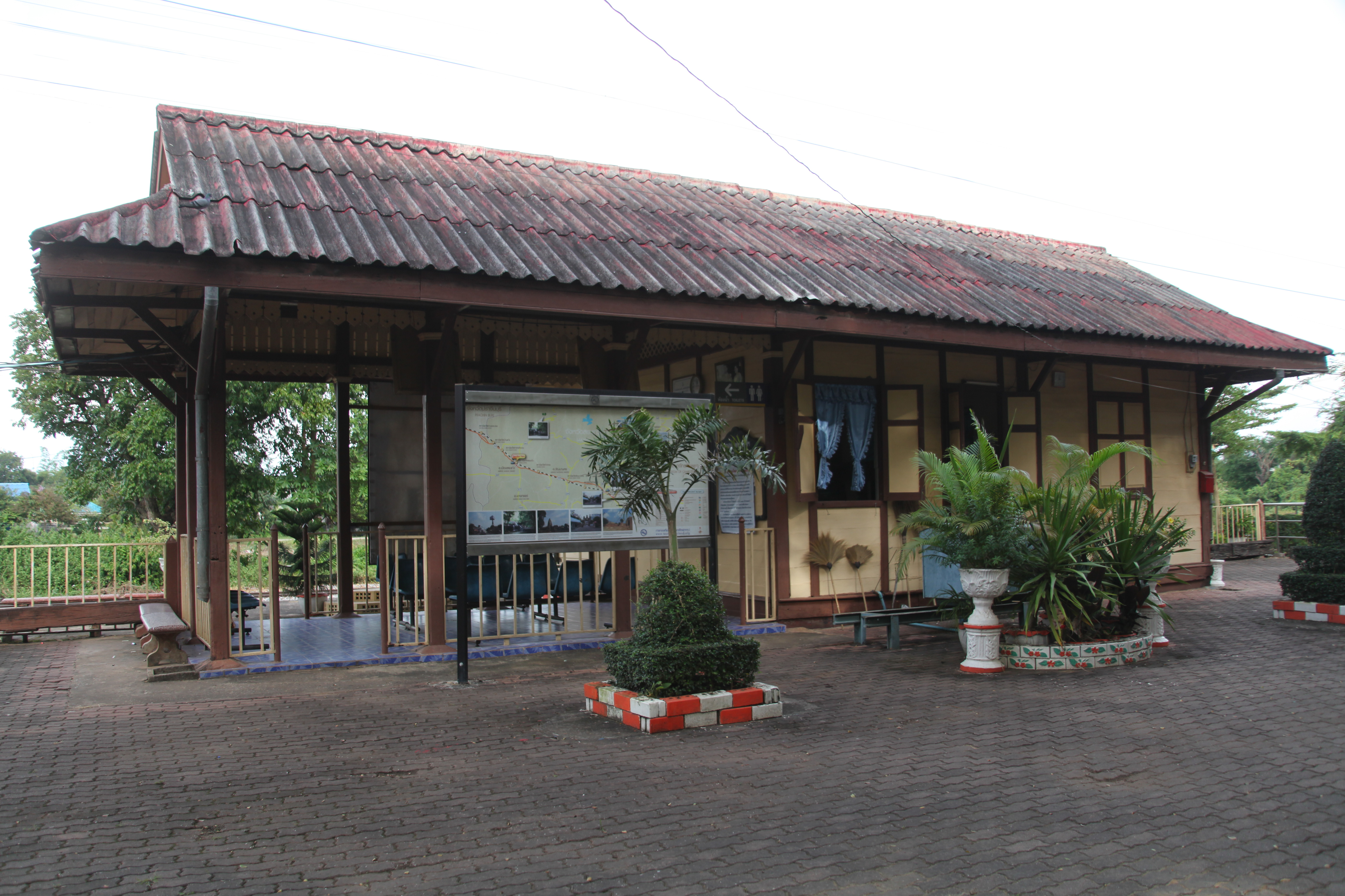 サケーオ駅